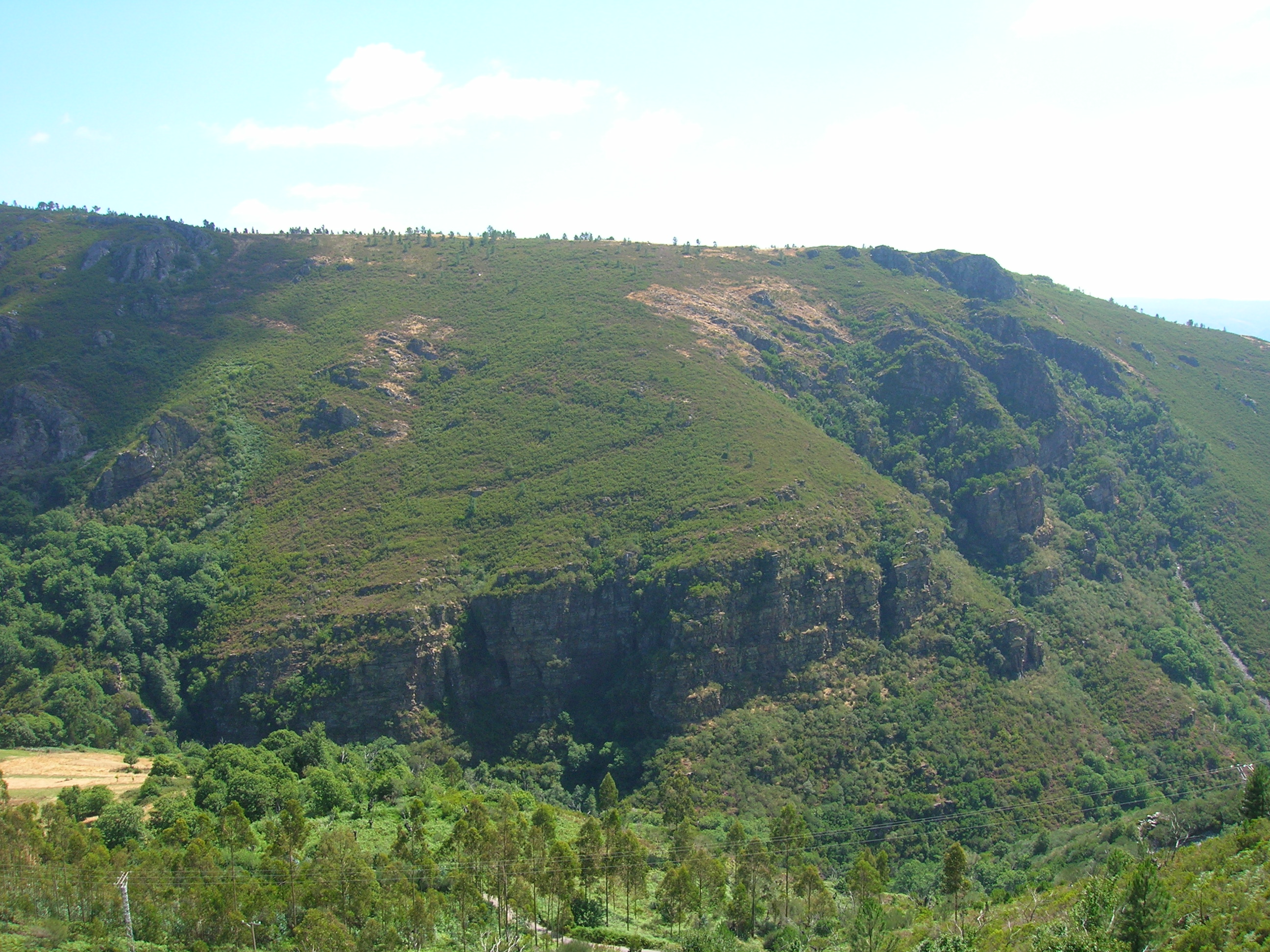 Vista del plegamiento geológico de Campodola-Leixazos en la Sierra de O Caurel, en el municipio de Quiroga (Lugo, Galicia). Más información en